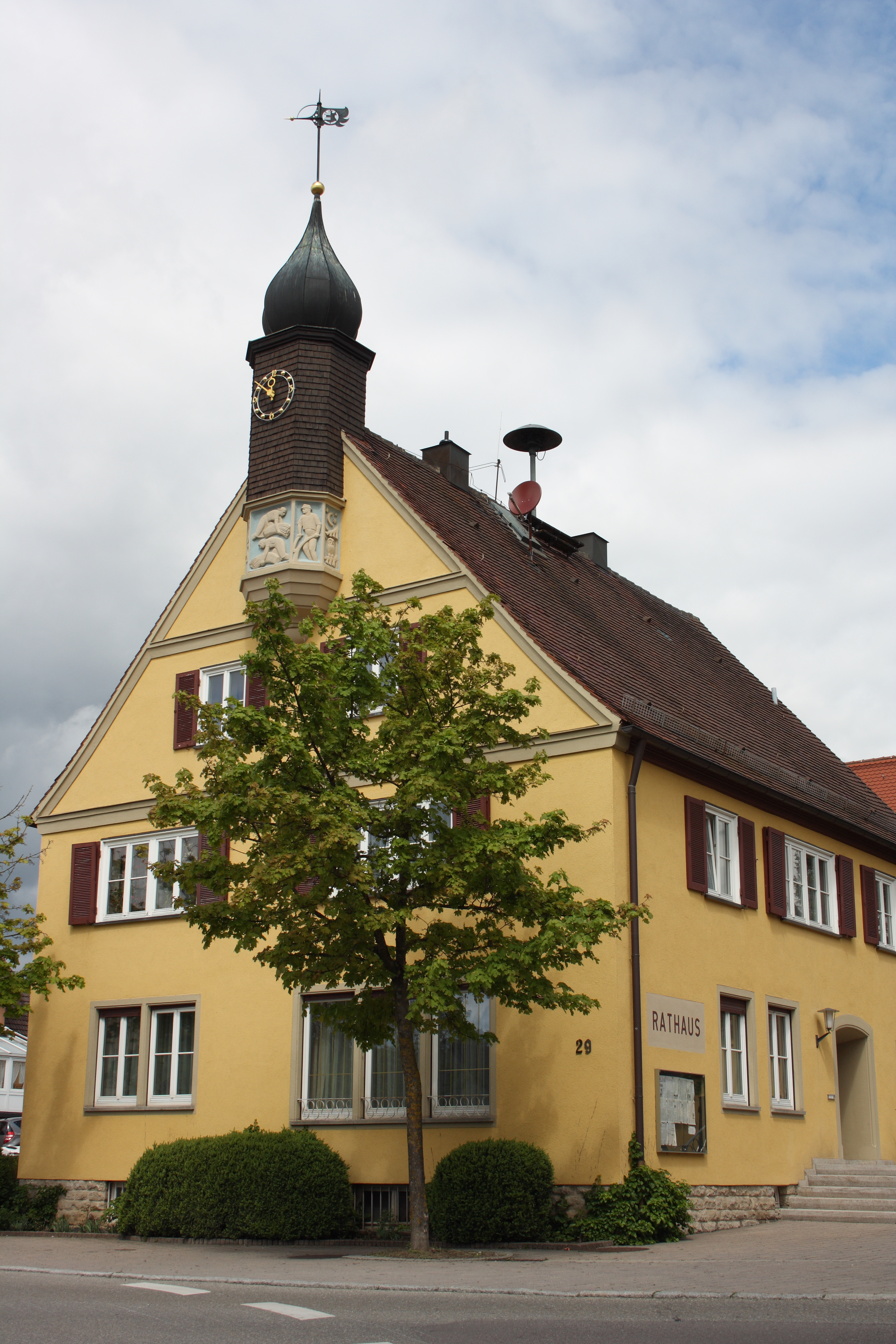 Rathaus in Großaltdorf, einem Stadtteil von Vellberg im Landkreis Schwäbisch Hall (Baden-Württemberg